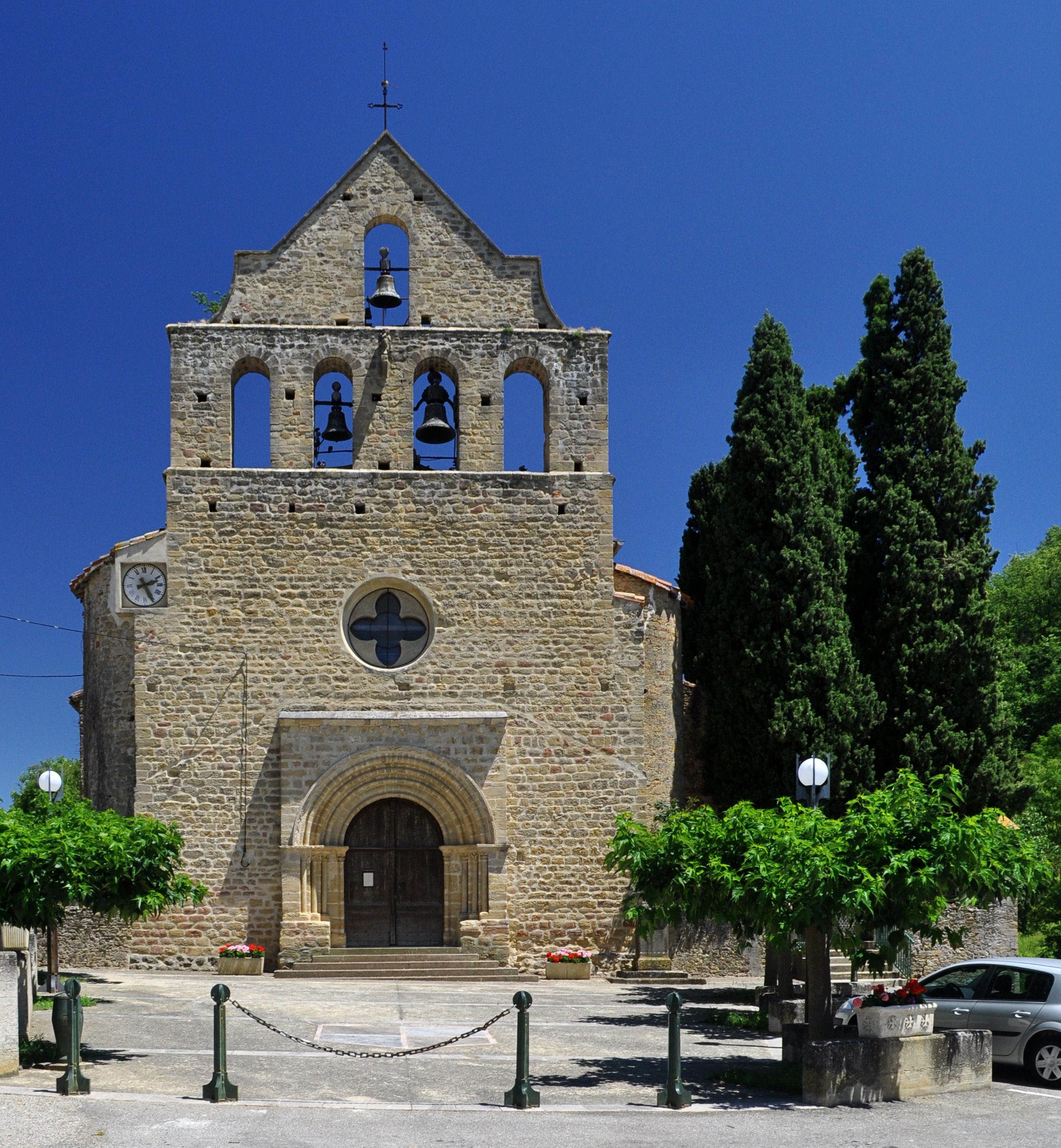 église Saint Jean l'évangéliste à Teilhet (Ariège)